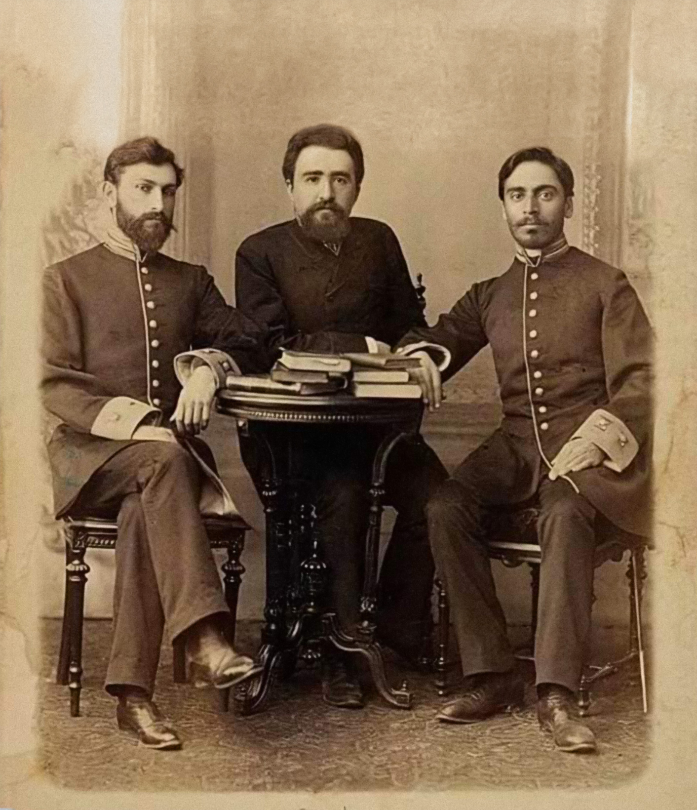 Solda Əli bəy Hüseynzadə, ortada Əlimərdan bəy Topçubaşi. Peterburq